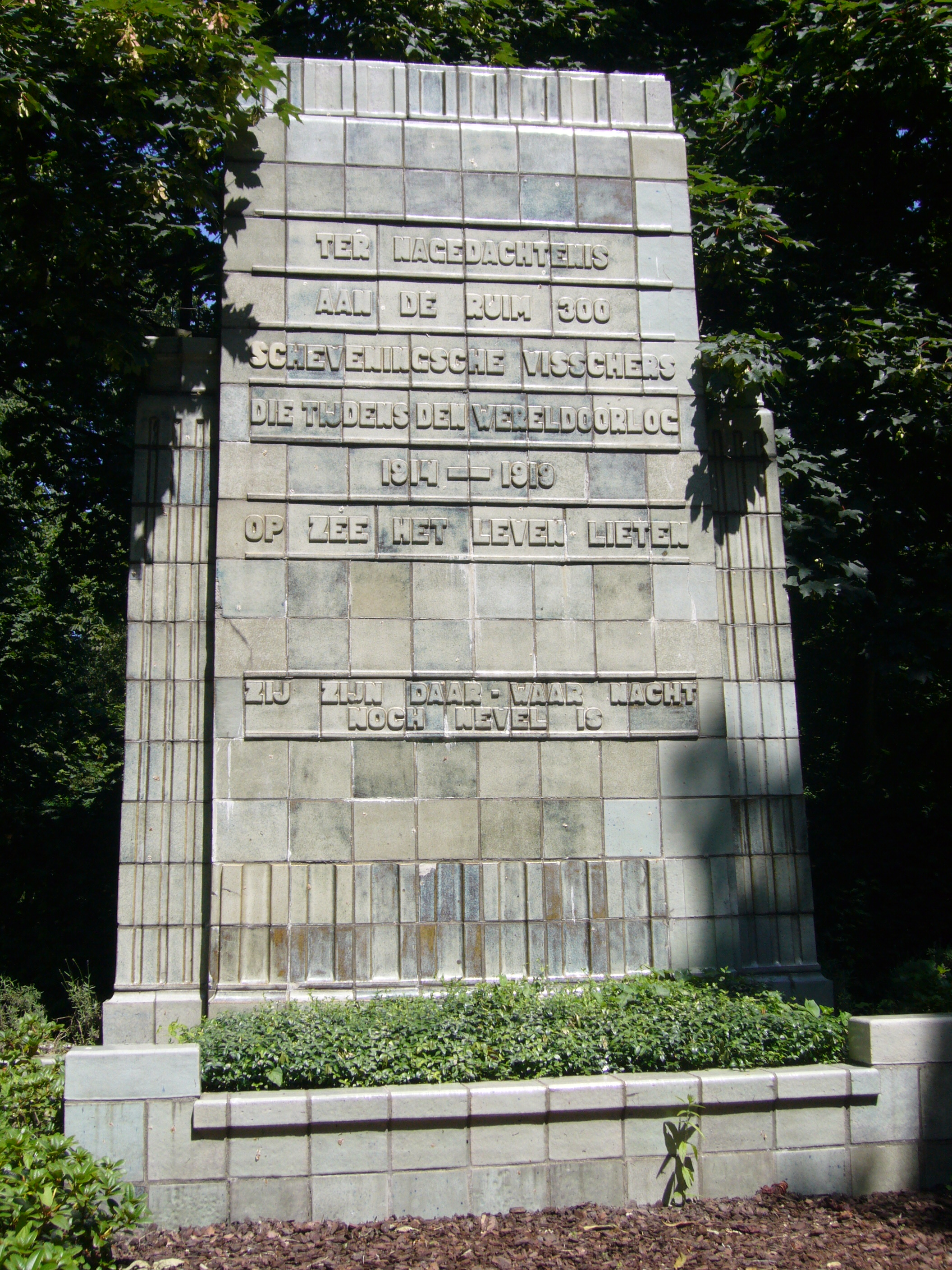 Monument WWI aan de Scheveningseweg voor 300 Scheveningse vissers